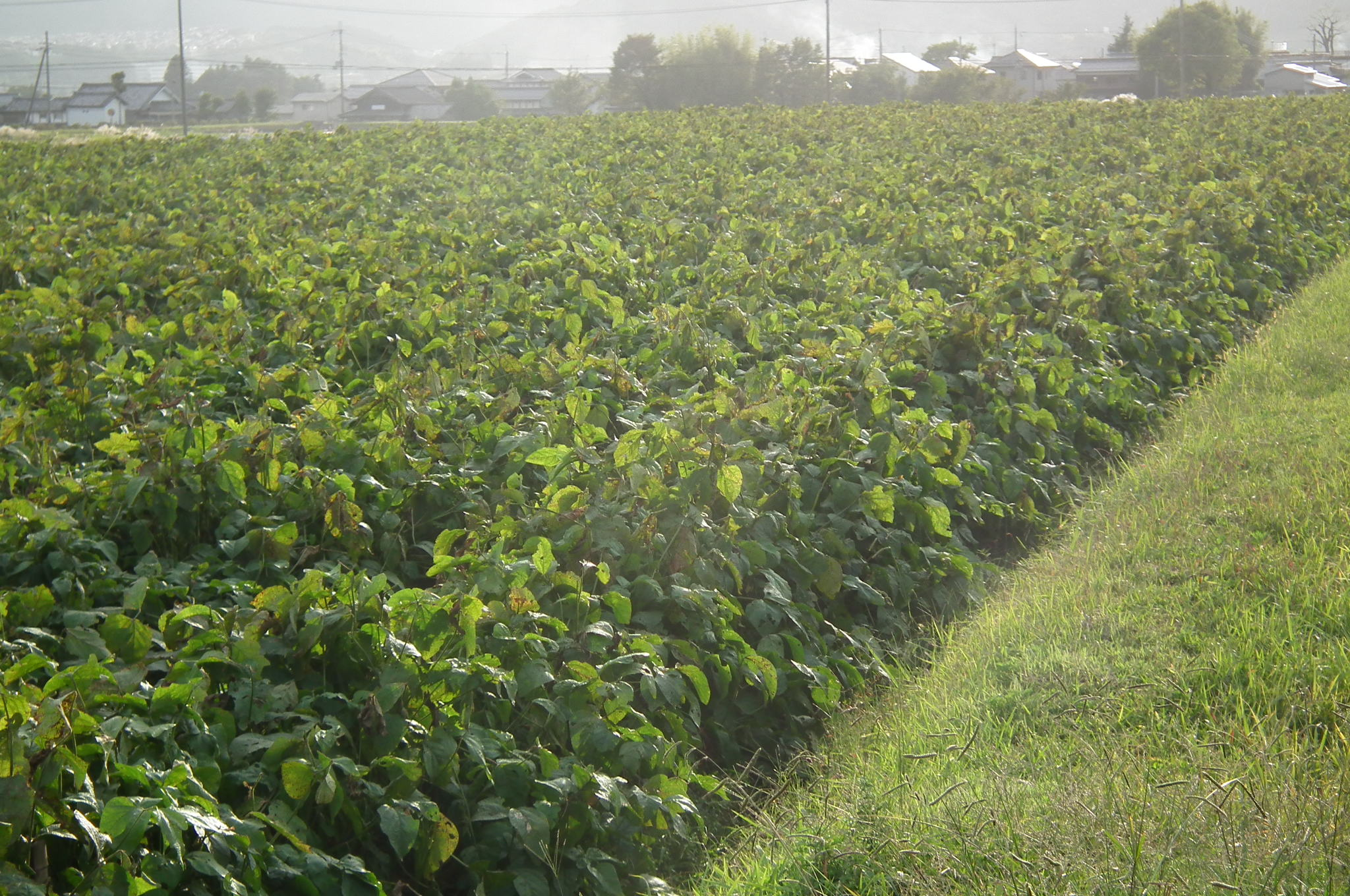 Tamba-guro 丹波黒 枝豆